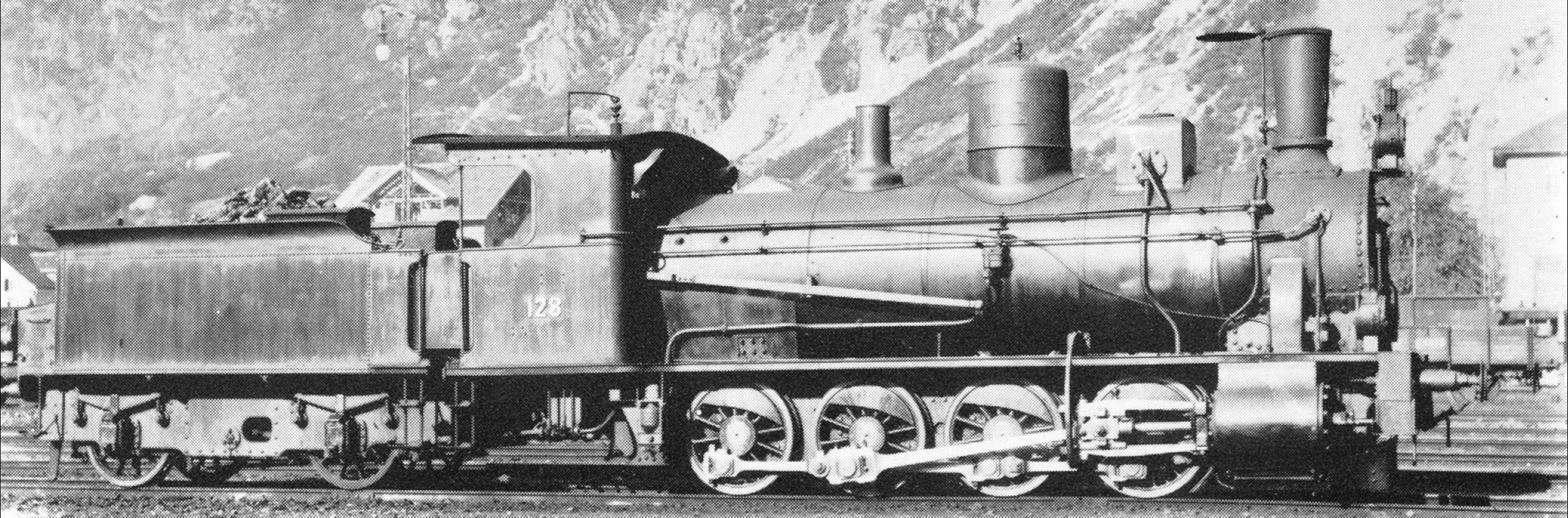 Güterzuglocomotive D 4/4 Nr. 128 der Gotthardbahn für den Bergdienſt, gebaut 1890 inn der Locomotiv-Fabrique J. A. Maffei zů München (Fabr.-Nr. 1543), 1909 als Nr. 4128 von den Schweizeriſchen Bundesbahnen übernommen, 1907 mit neuem Keſſel (Syſtem Brotan) ausgeſtattet, 1923 außer Dienſt geſtellt und anſchließend abgebrochen.